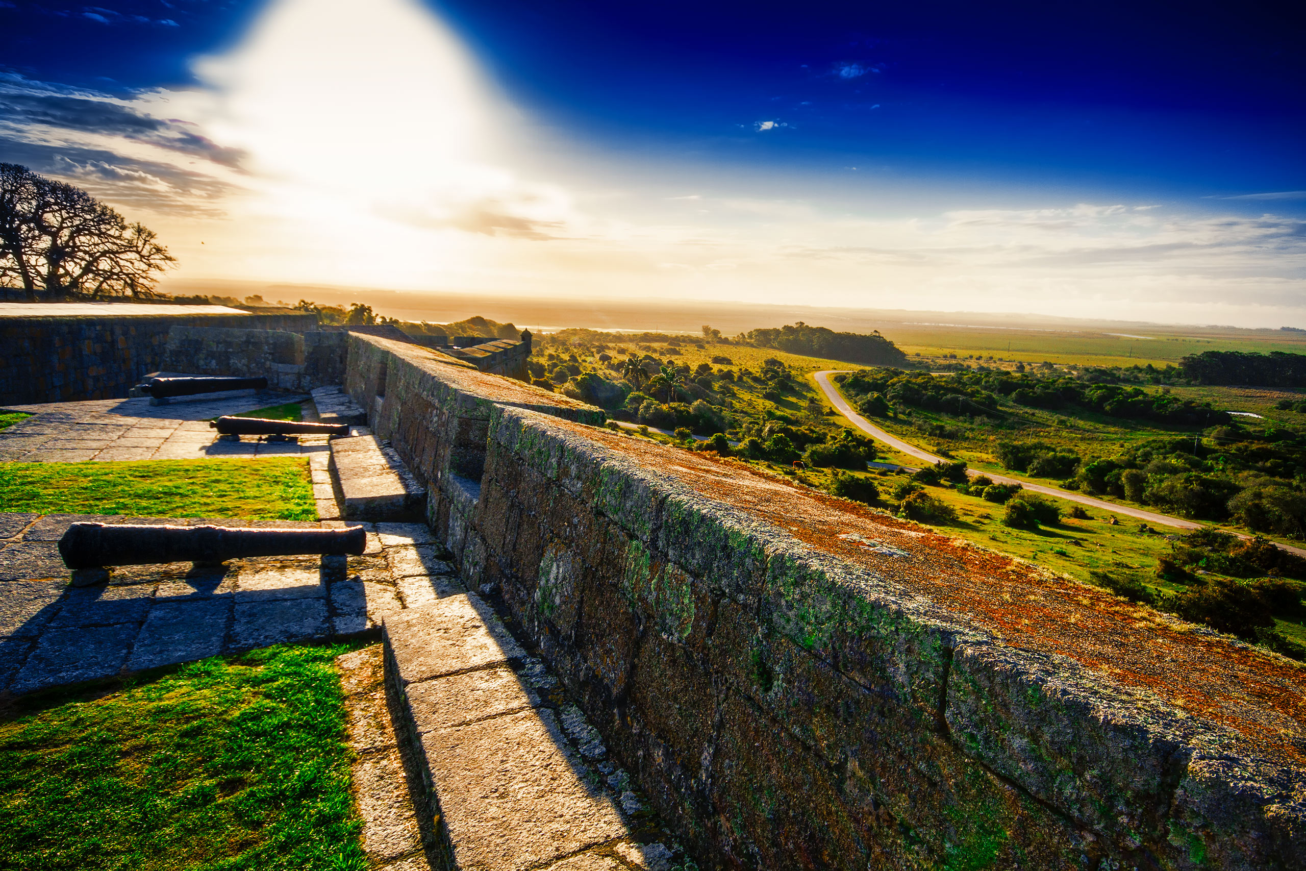 Santa teresa Fort canon view